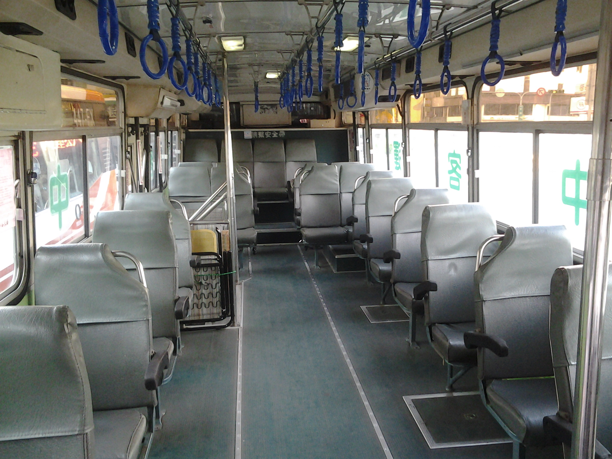 台中客運 2001〈2011〉 HINO ERK2JML（日盈）